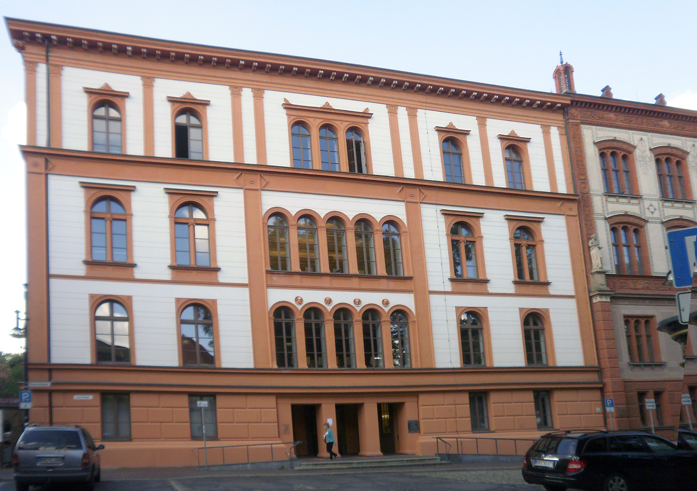 Neues Museum, Bj. 1844, Architekt war der Hofbaumeister Georg Adolph Demmler (1804–1886), Bestandteil Hauptgebäude Universität Rostock